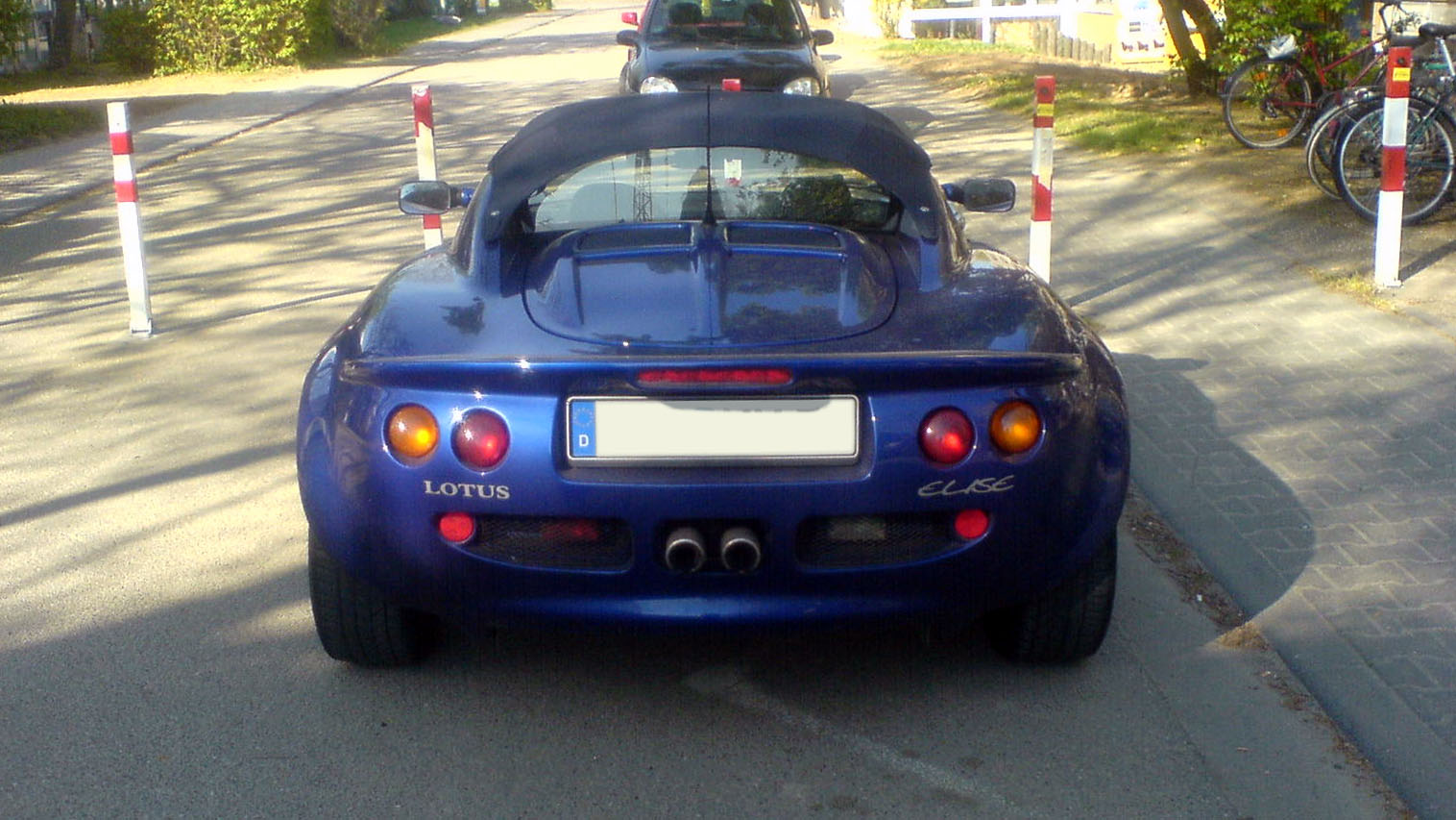 Lotus Elise 1st Gen.